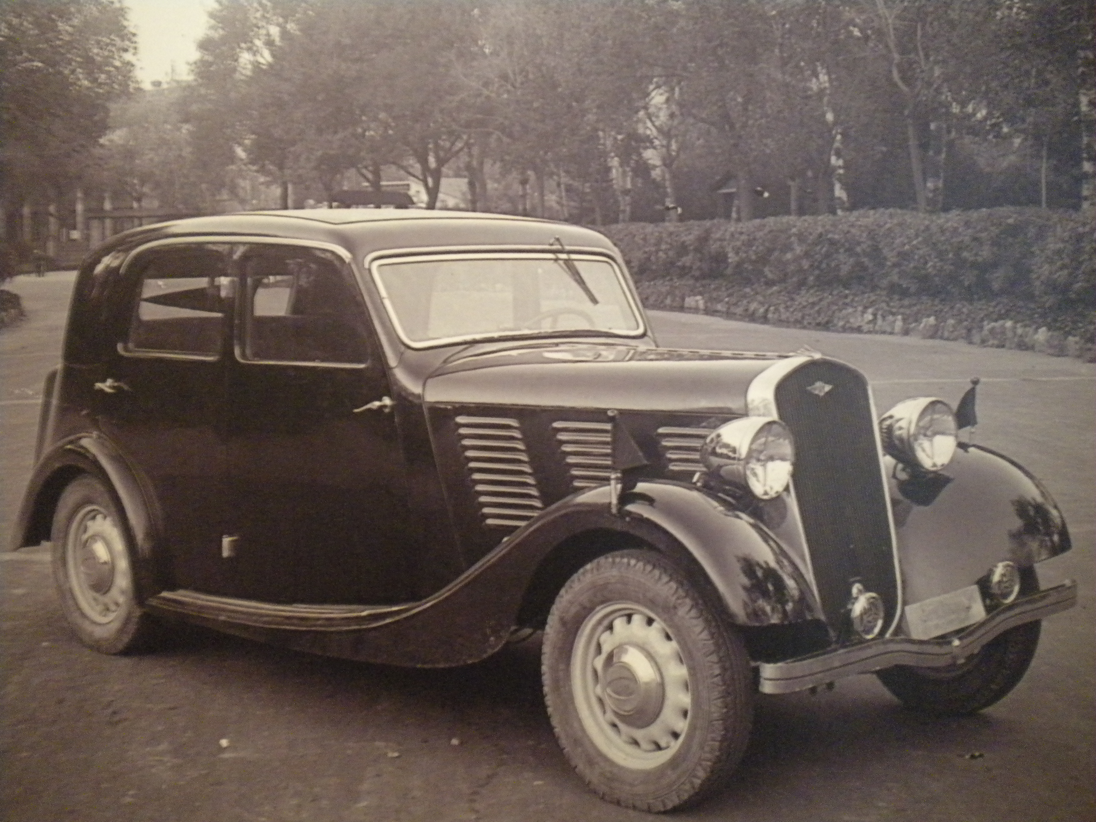 Fotografia d'un cotxe fabricat a Catalunya durant la dècada dels 30 i els 40.